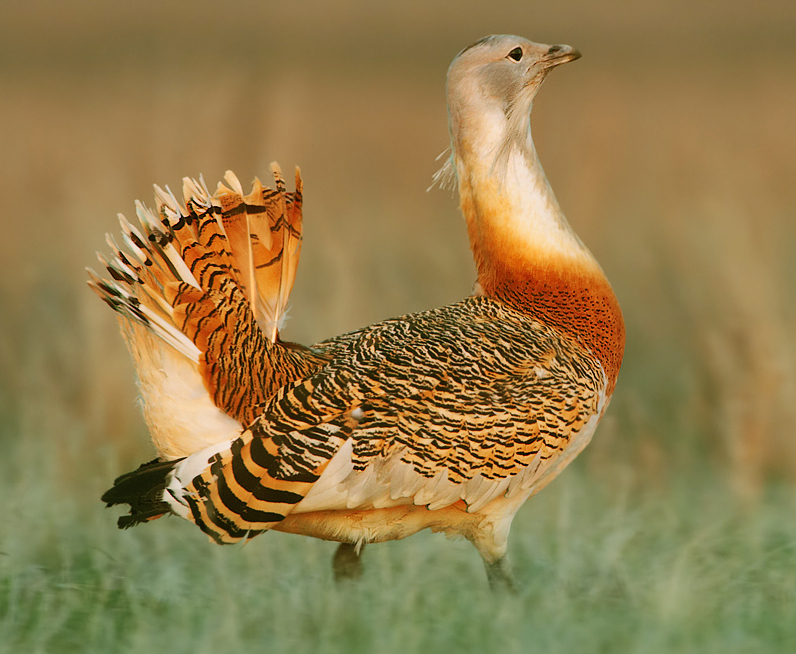 Дрофа